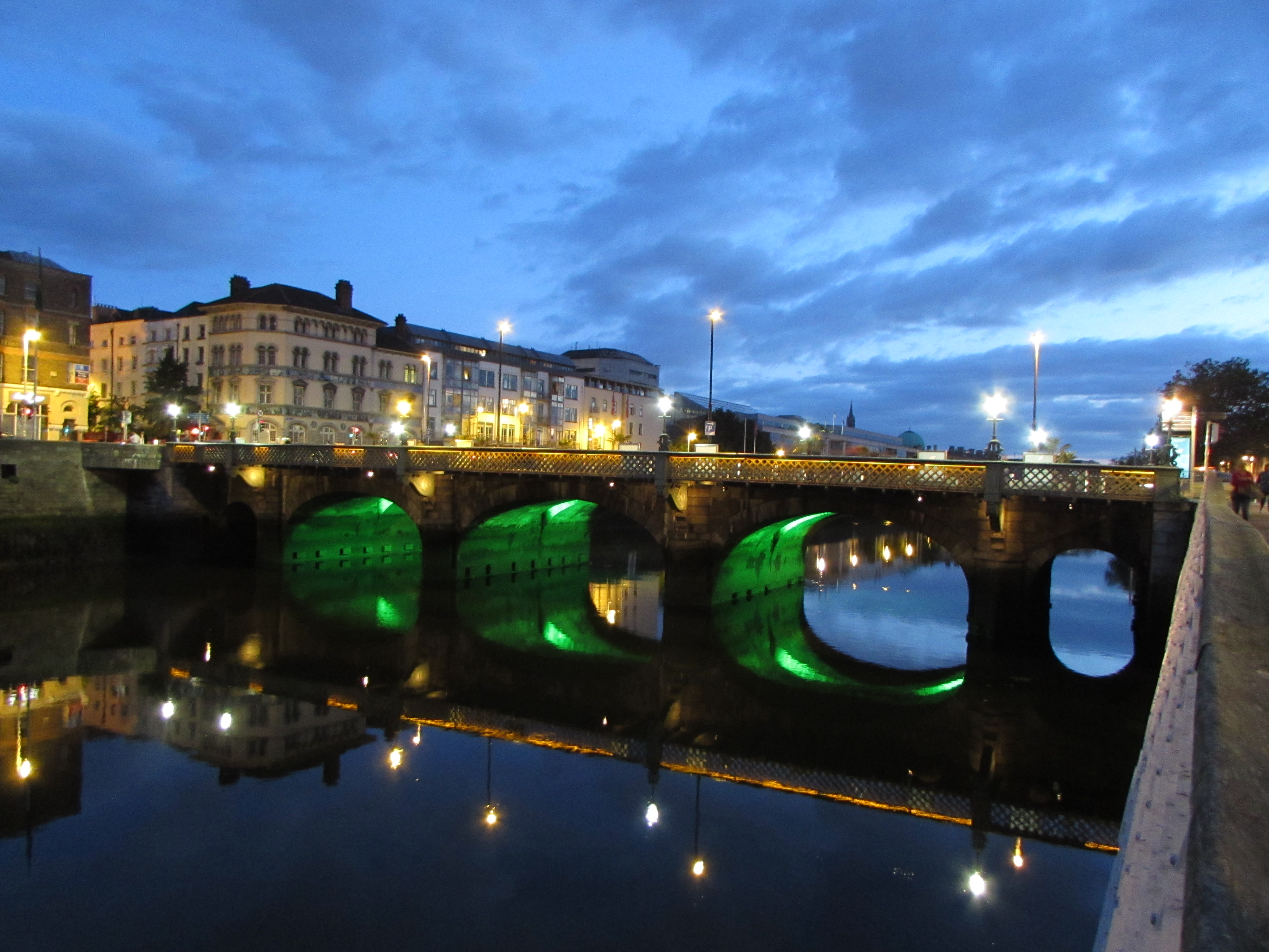 A night view of Grattan Bridge